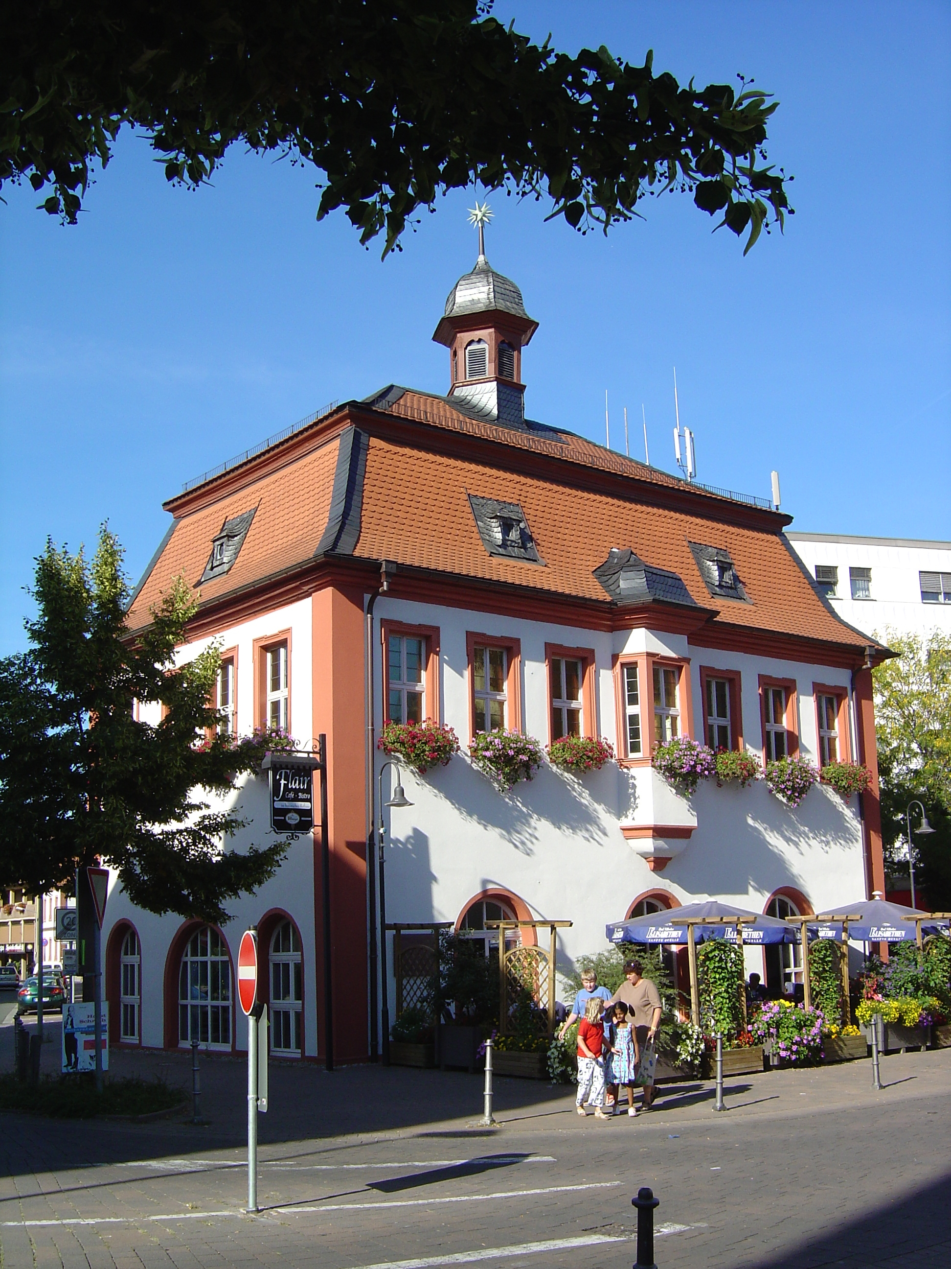 Blick auf das historische Rathaus der Stadt Bürstadt.